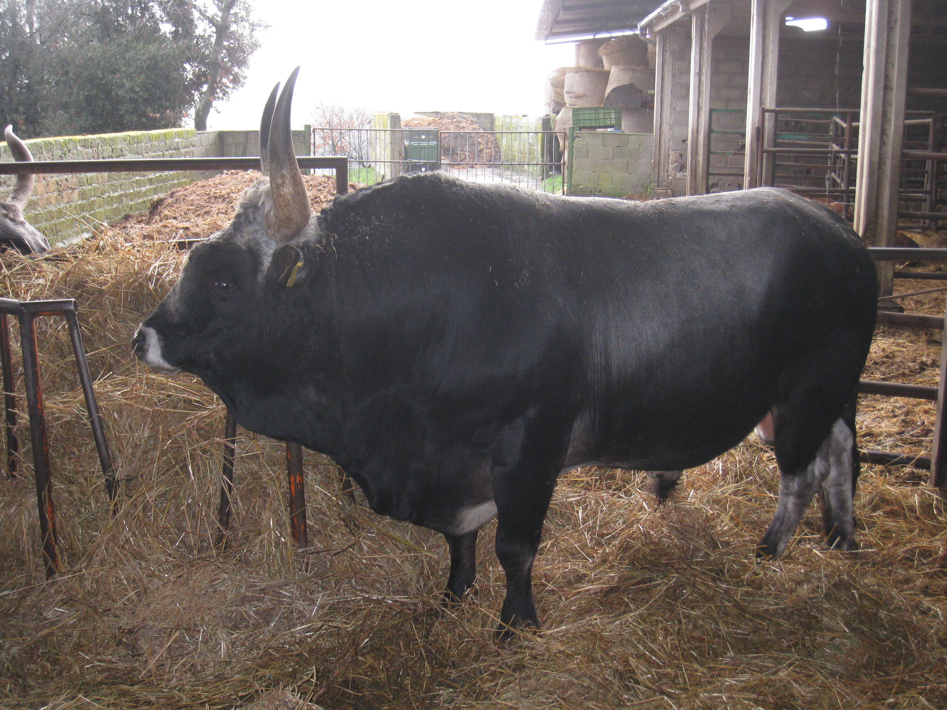 Maremmaner Bulle im Stall